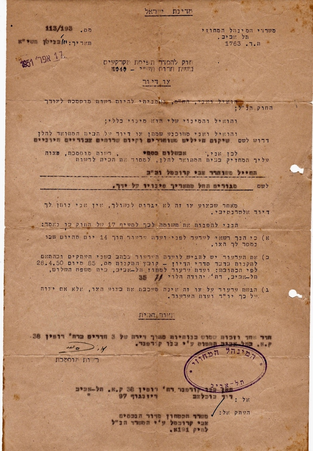 צו דיור לחייל המשוחרר צבי כרמל, 17/04/1951